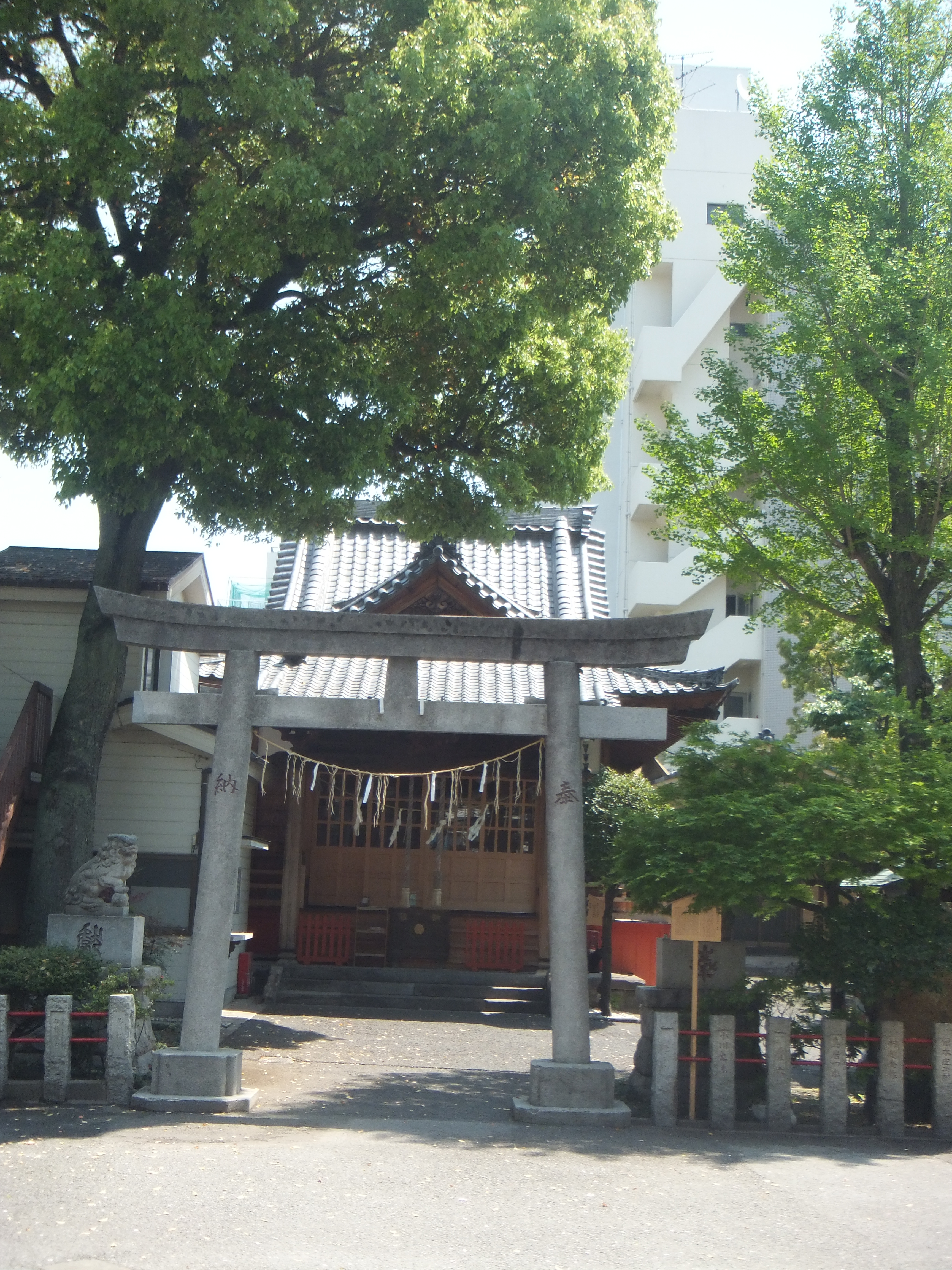 The Ejima-Sugiyama-Shrine (Ejima-Sugiyama-jinja) in Tokyo (Sumida-ku)